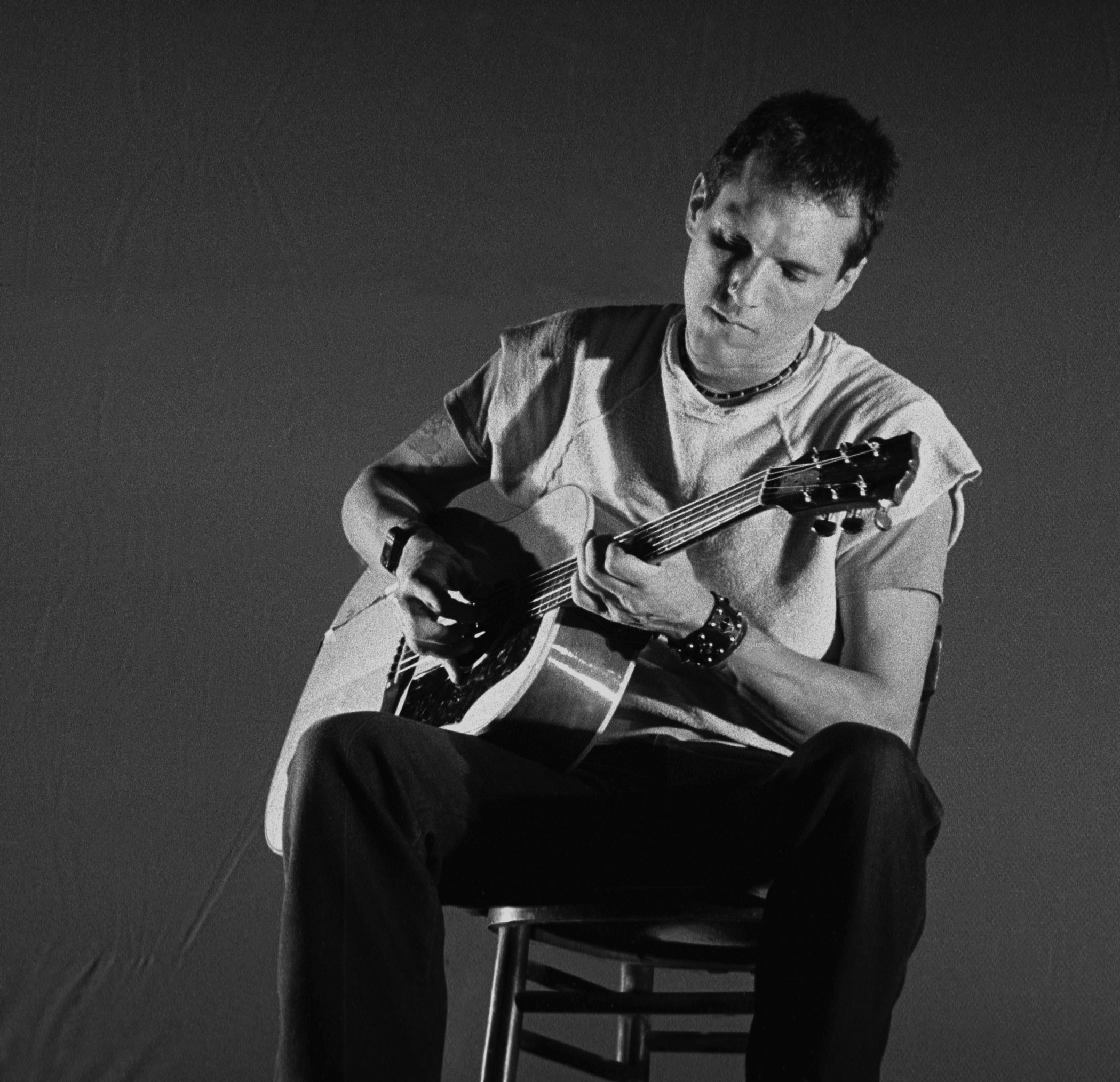 Jorma Kaukonen a Mestre nel 1984